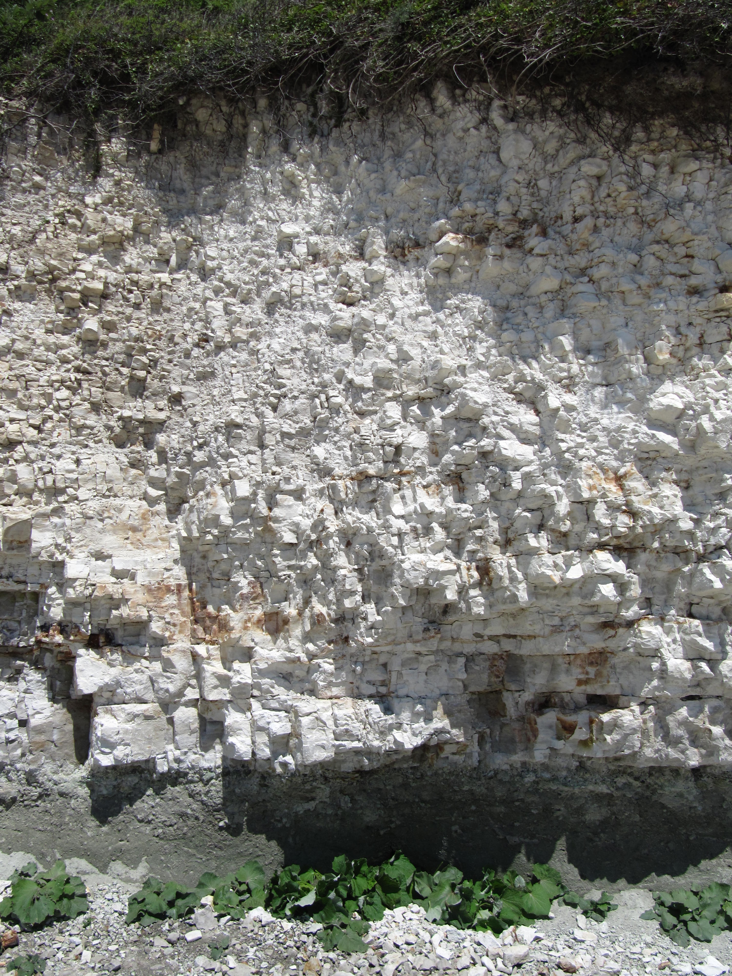 Arnager kalk over Arnager grønsand, klinten ved Arnager